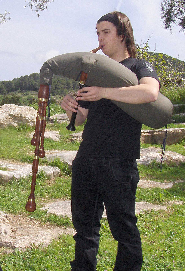 Xeremier.